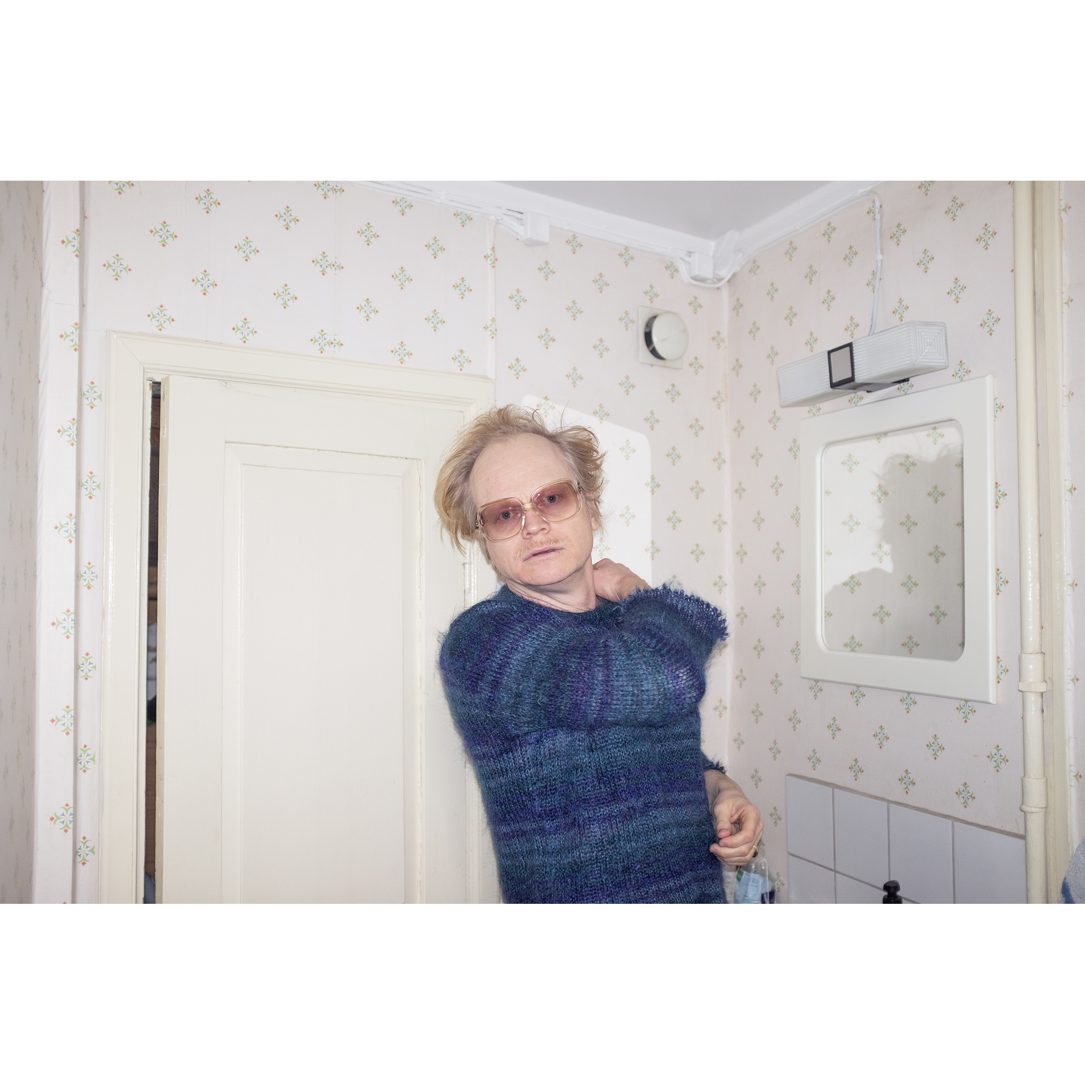 MARTIN LUUK - JANUARI 2019 av KRISTIAN BENGTSSON